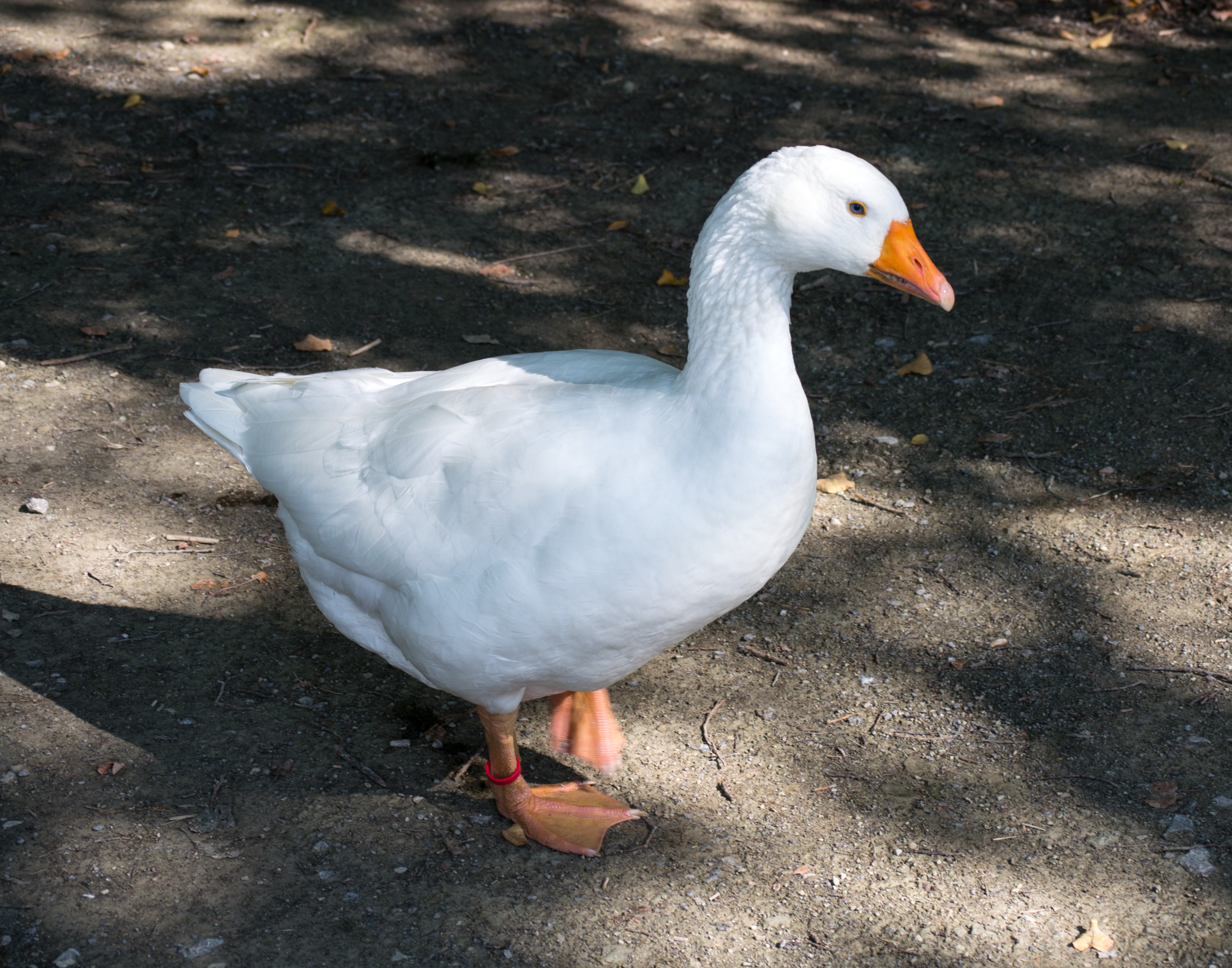 Lippegans im LWL-Freilichtmuseum Detmold